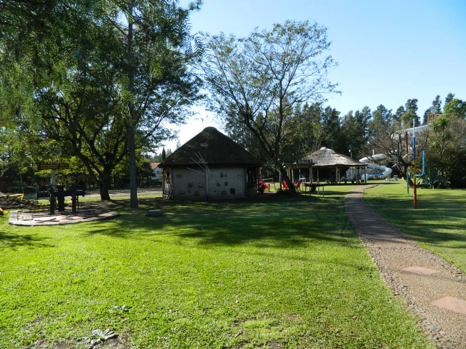 Imagen de paisaje de salto.